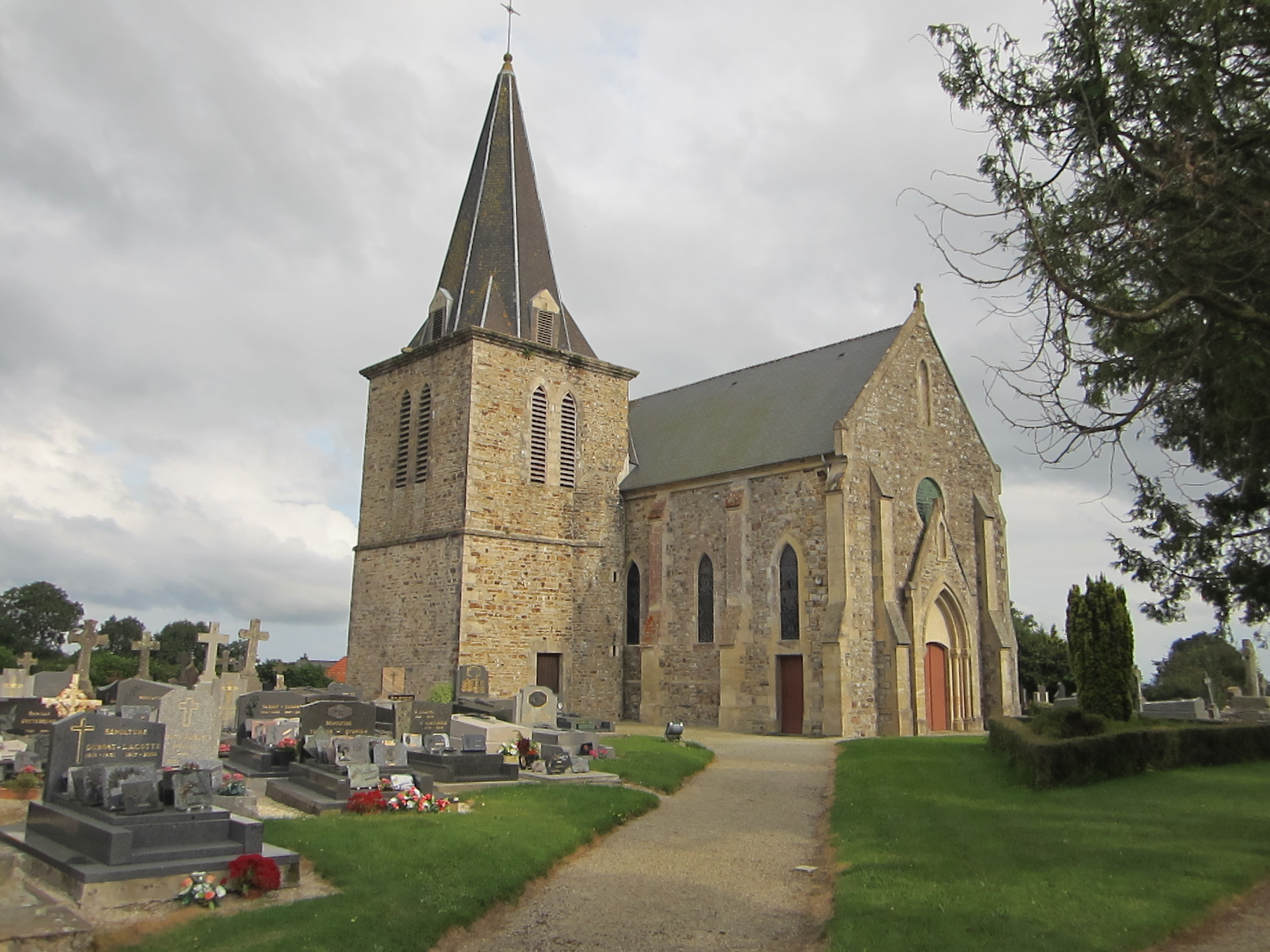 église Saint-Pierre de fr:-Pierre-d'Arthéglise